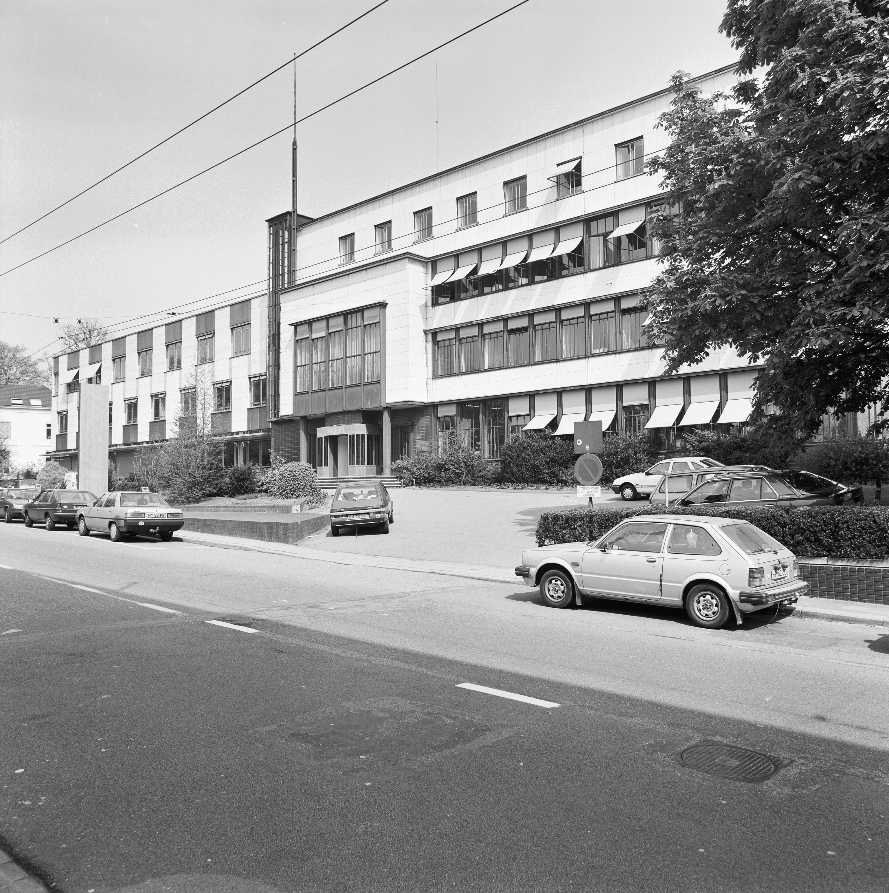 P.G.E.M. GEBOUW: Exterieur VOORGEVEL